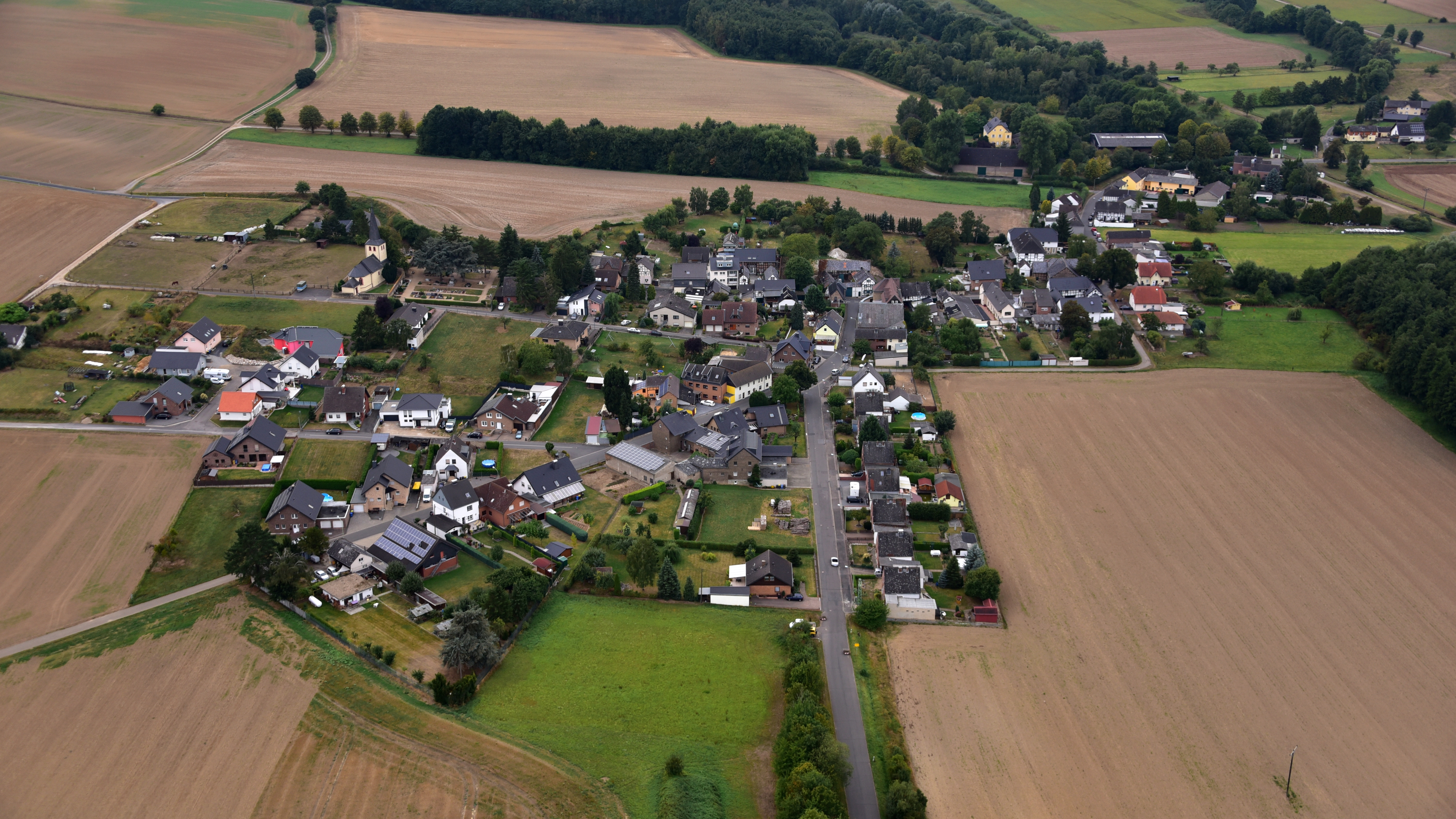 Juntersdorf, Luftaufnahme (2016)